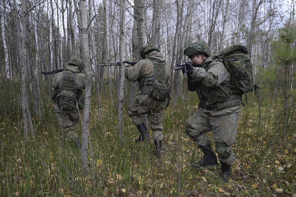 Командно-штабное учение с новосибирским соединением Ракетных войск стратегического назначения.